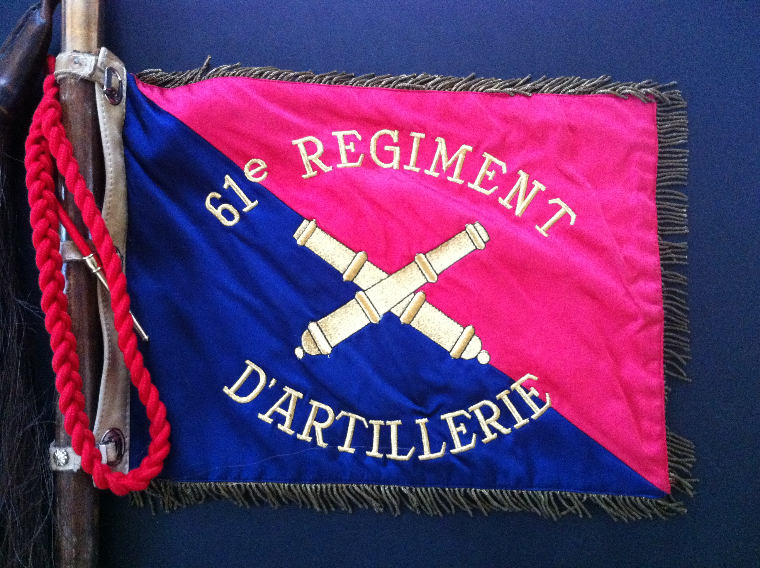 Verso du fanion de la 3ième batterie du 61e régiment d'artillerie